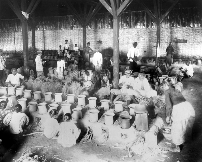 Repronegatief. Vis-bereiding (pindang) in de visinzoutingsloods te Blimbing, Oost Java